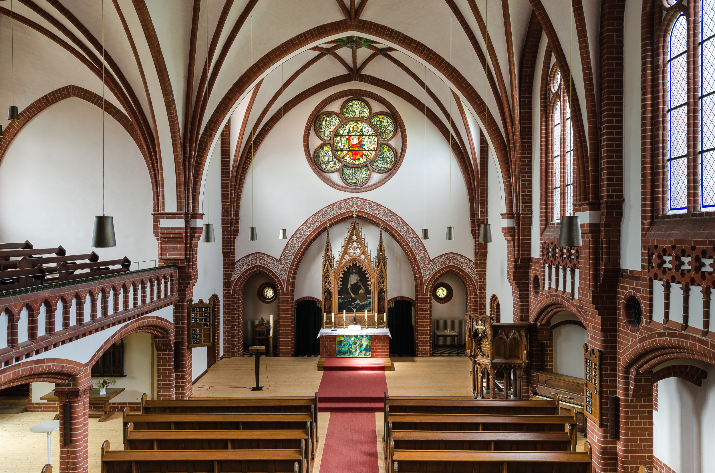 Innenansicht der St.-Johannis-Kirche in Hannovers Stadtteil Misburg